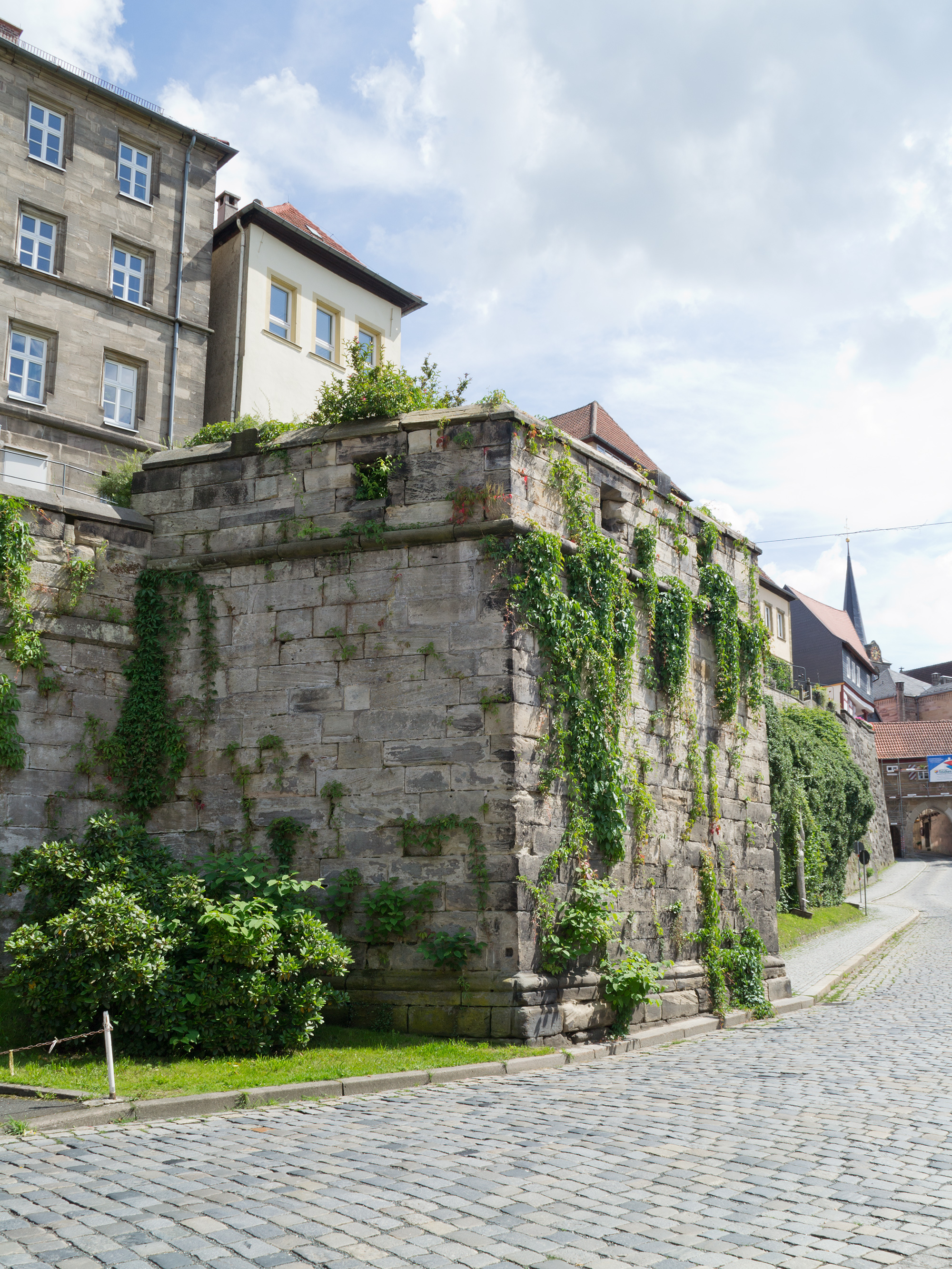 Neues Werk in der Schwedenstraße in Kronach